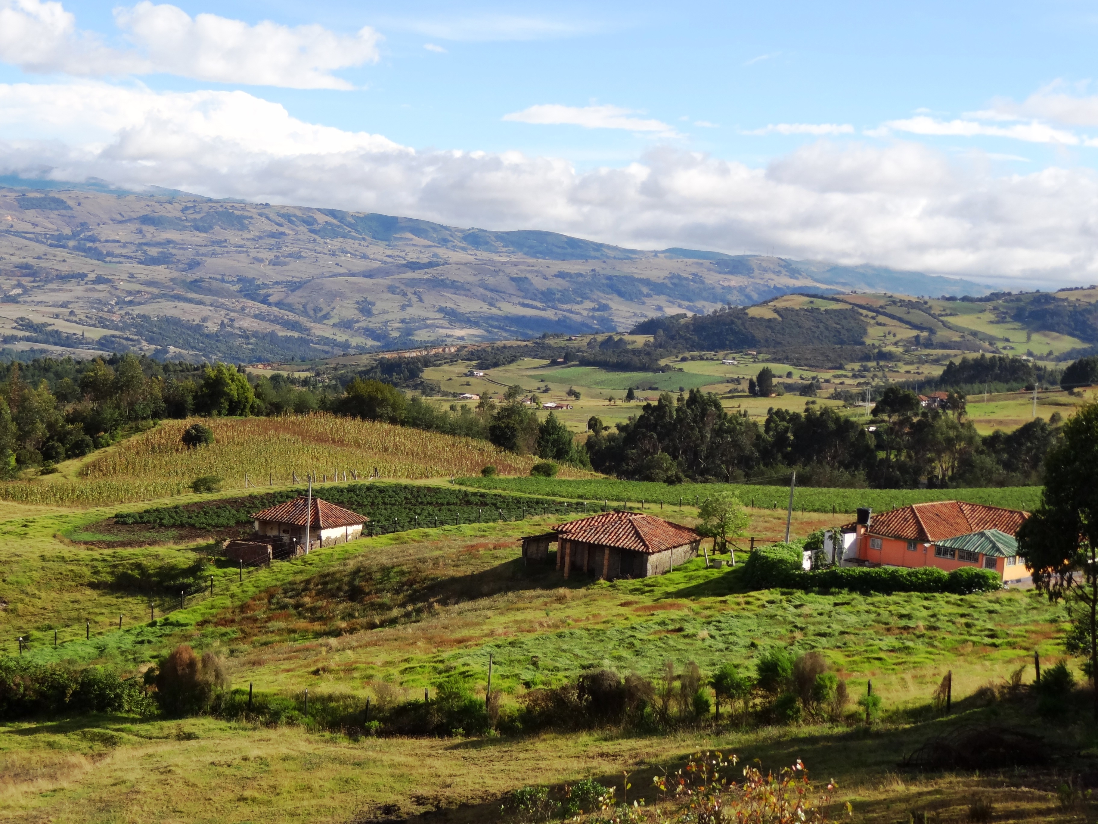 Paraje rural del municipio de Cómbita, departamento de Boyacá, Colombia.